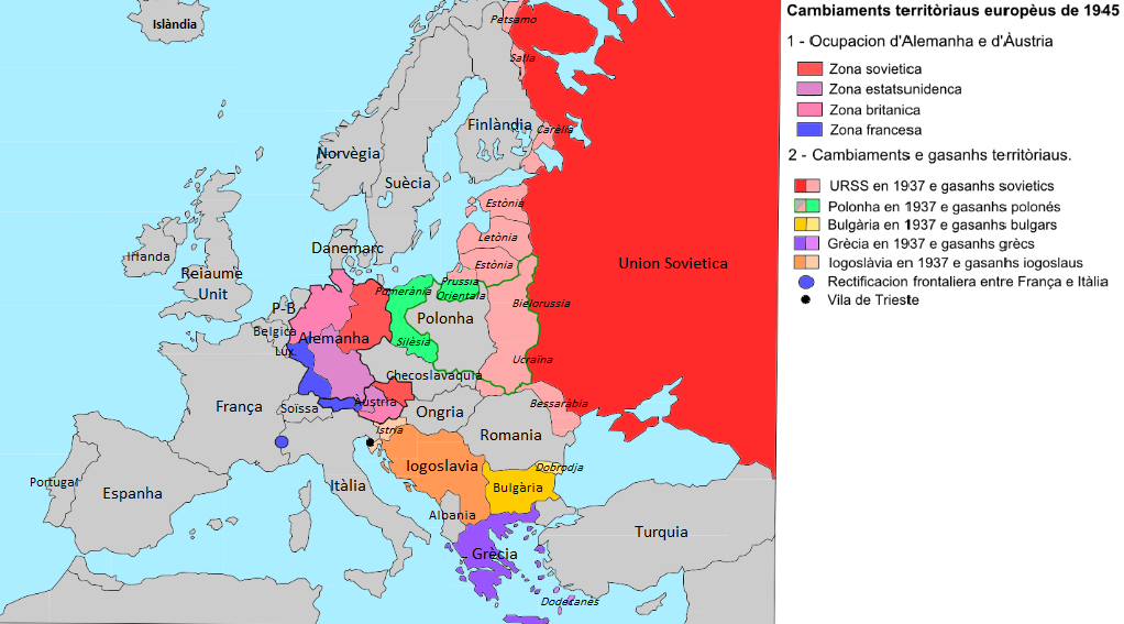 Cambiaments territòriaus europèus de 1937 a 1945.